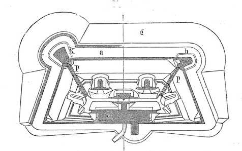 Typisches Zwischenwerk des 19. Jahrhunderts (Entspricht größtenteils dem erhaltenen Zwischenwerk VIII b in Köln-Marienburg)